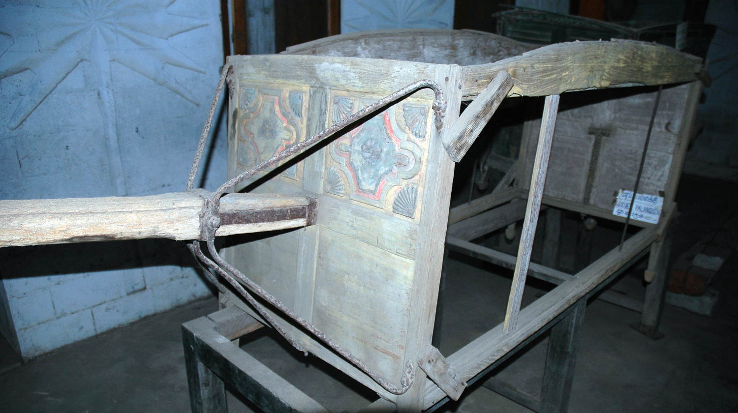 மரப் பல்லக்கு - தொல் பொருட்காட்சிச்சாலை, யாழ்ப்பாணம்